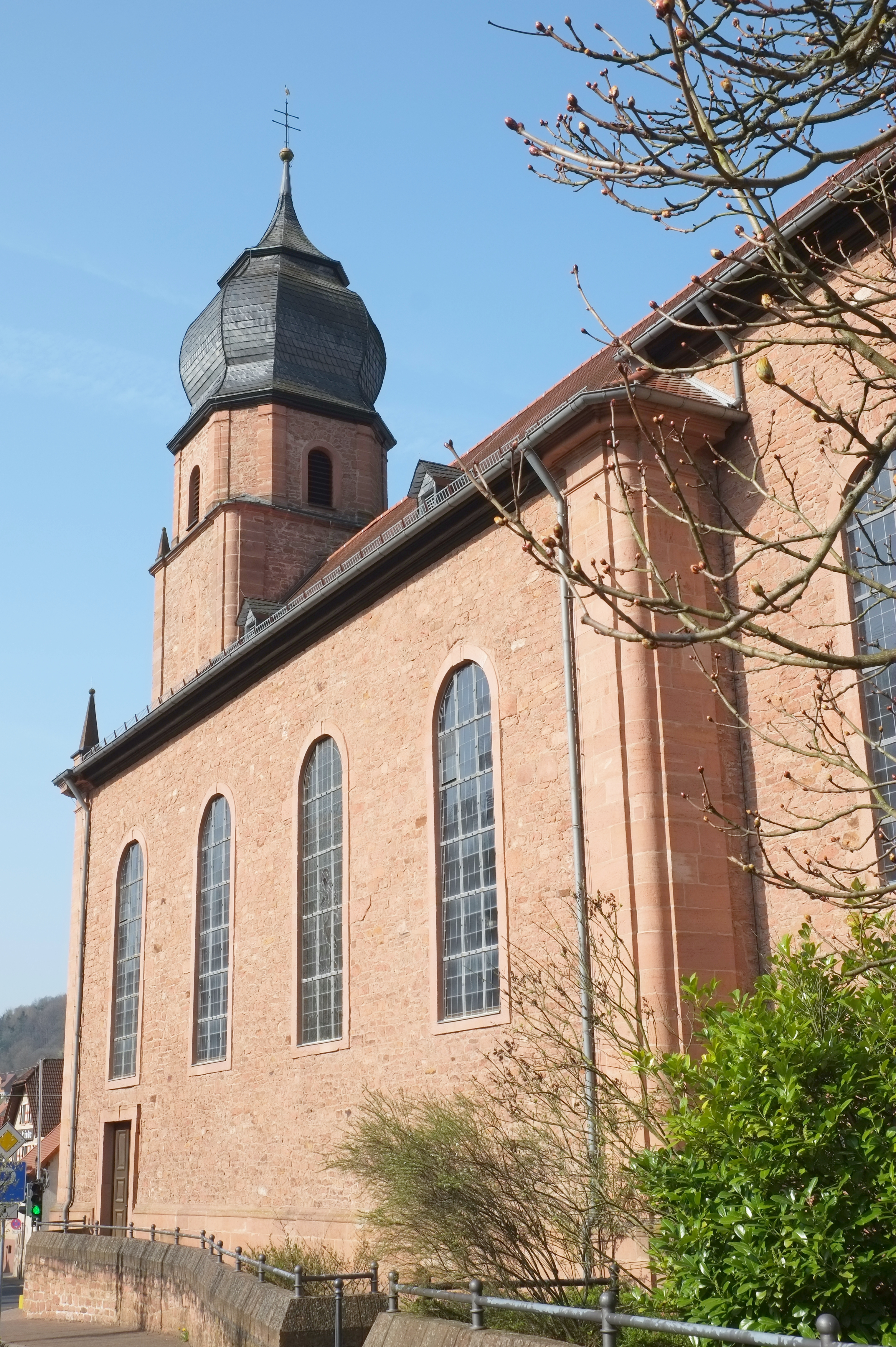 Katholische Pfarrkirche St Martin in Heimbuchenthal im Landkreis Aschaffenburg (Bayern, Deutschland)